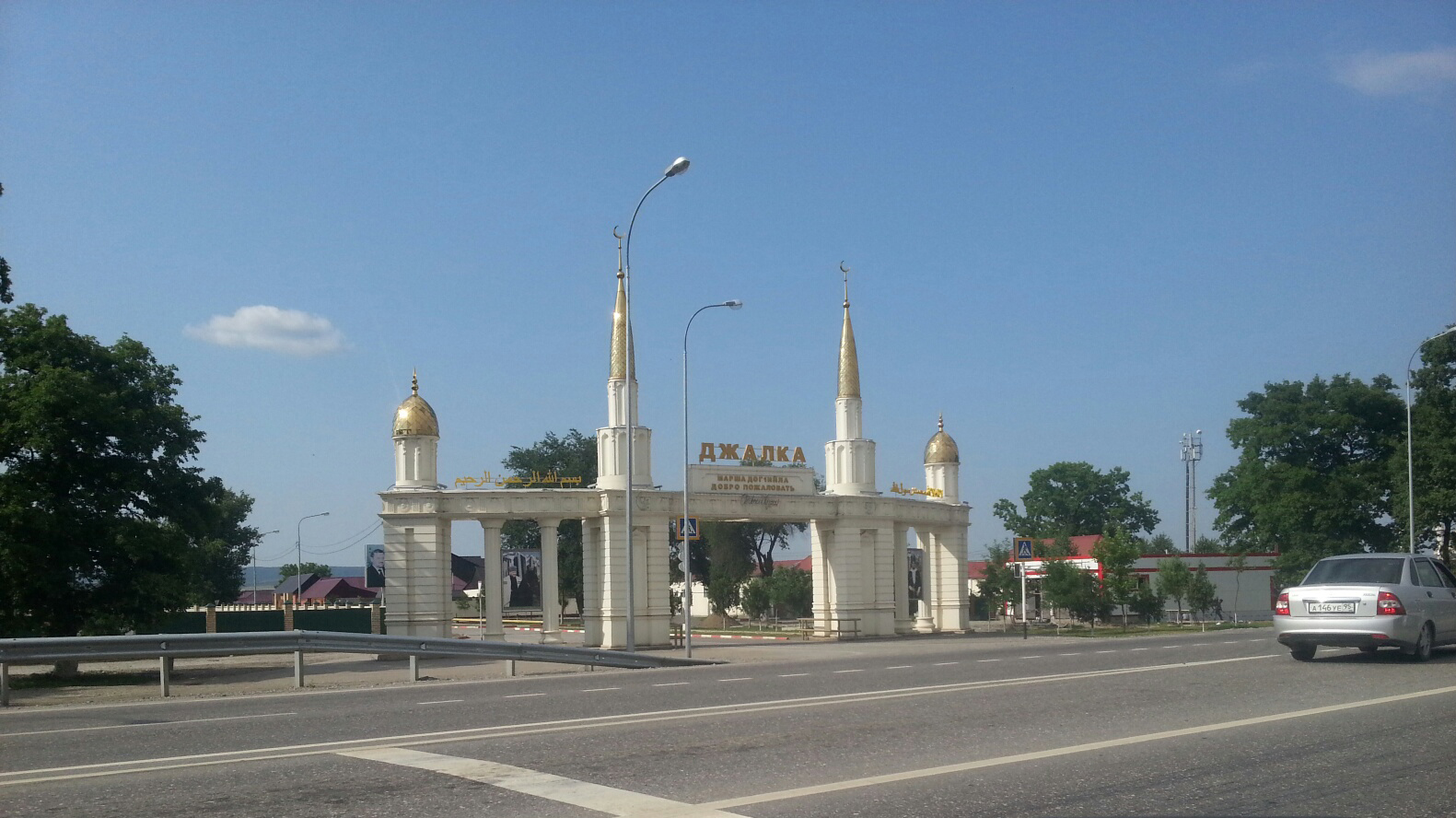 Въезд в Джалку